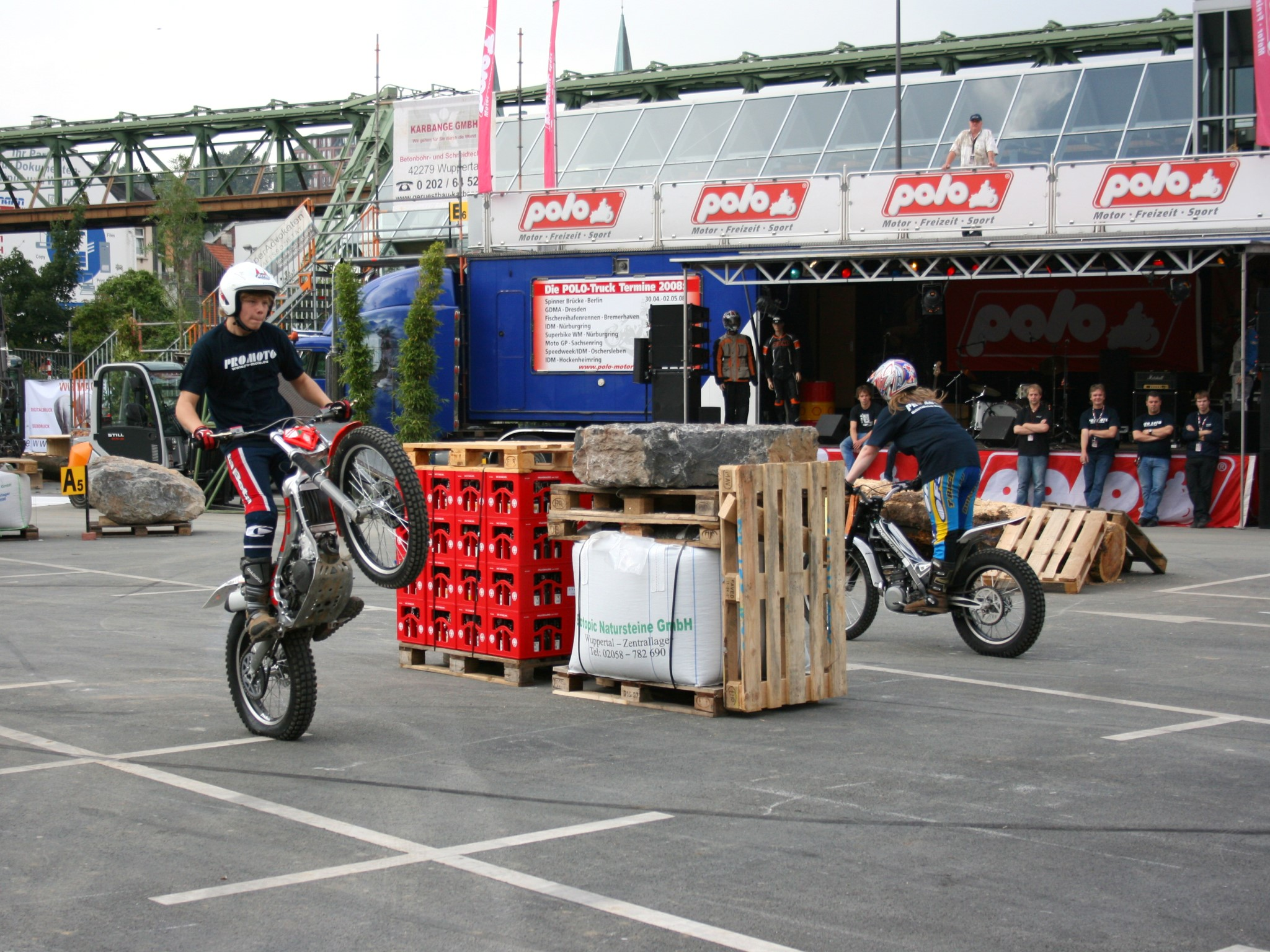 NRW-Tag an der Ohligsmühle in Wuppertal